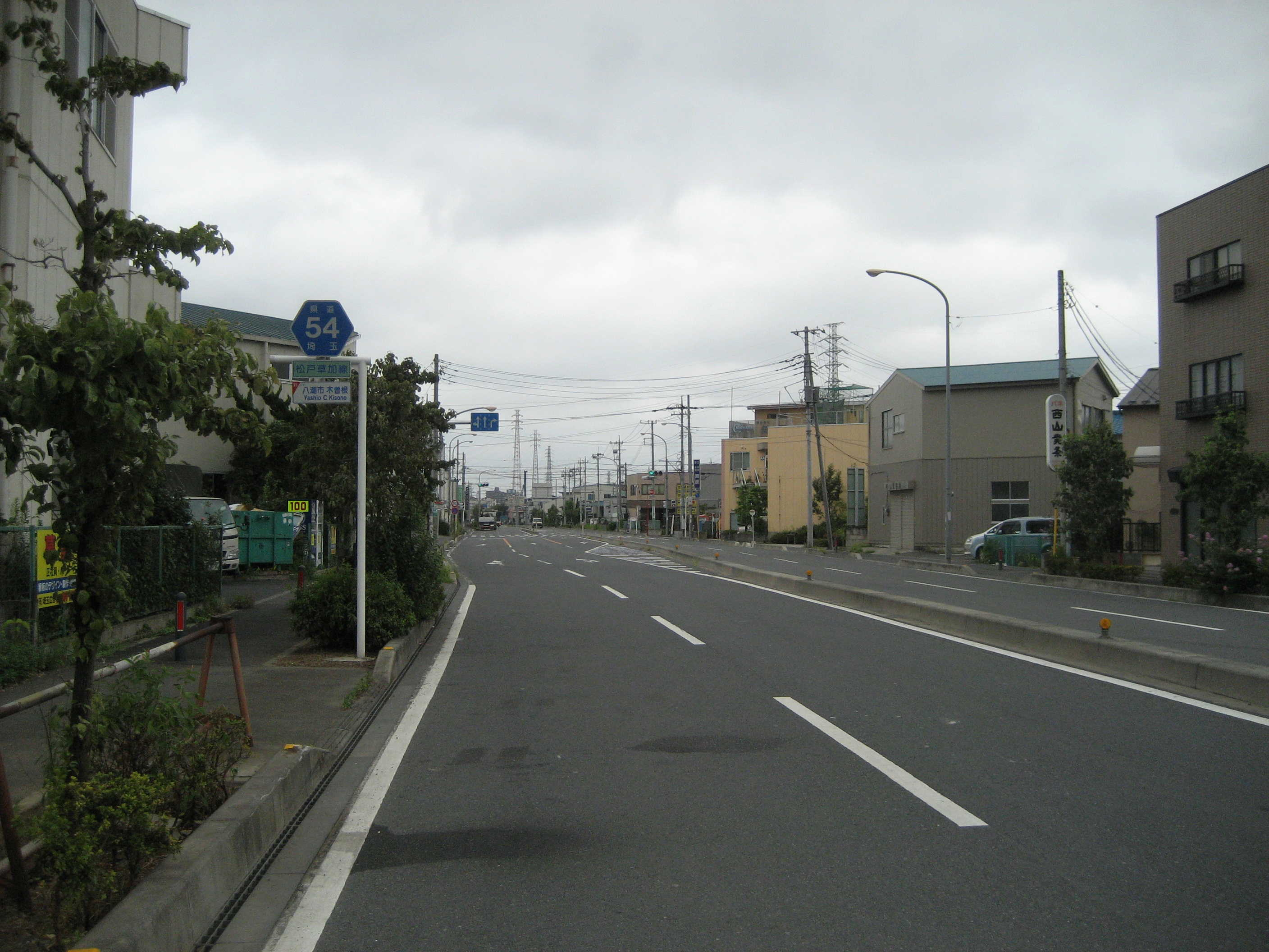 埼玉県道54号線八潮市木曽根